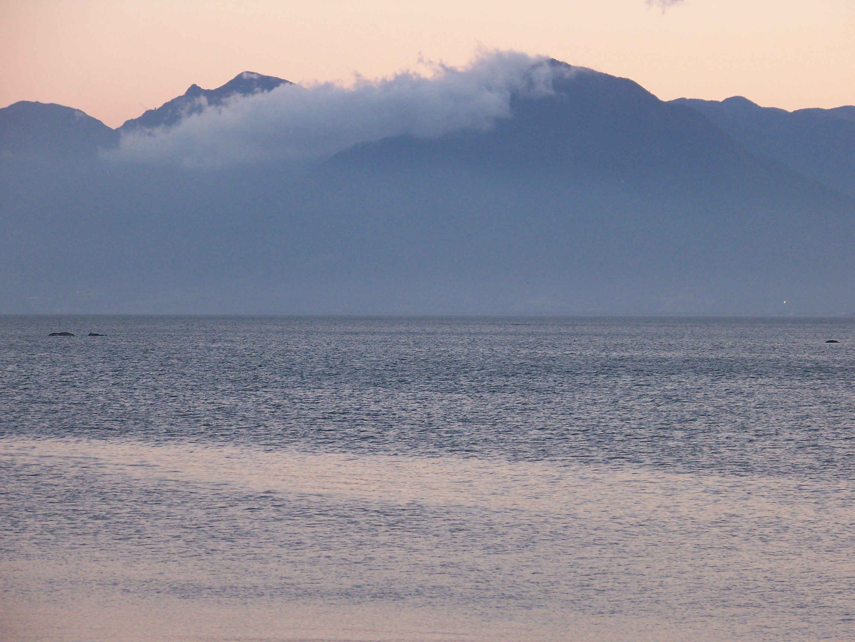 vista do morro do Cambirela